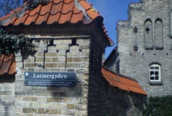 Latinergyden med Aalborg kloster i baggrunden